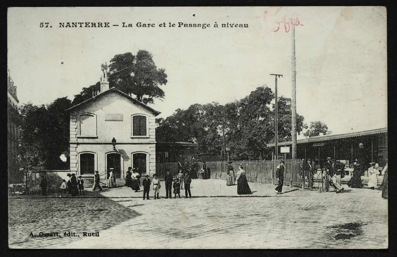 Nanterre.Gare.Passage à niveau